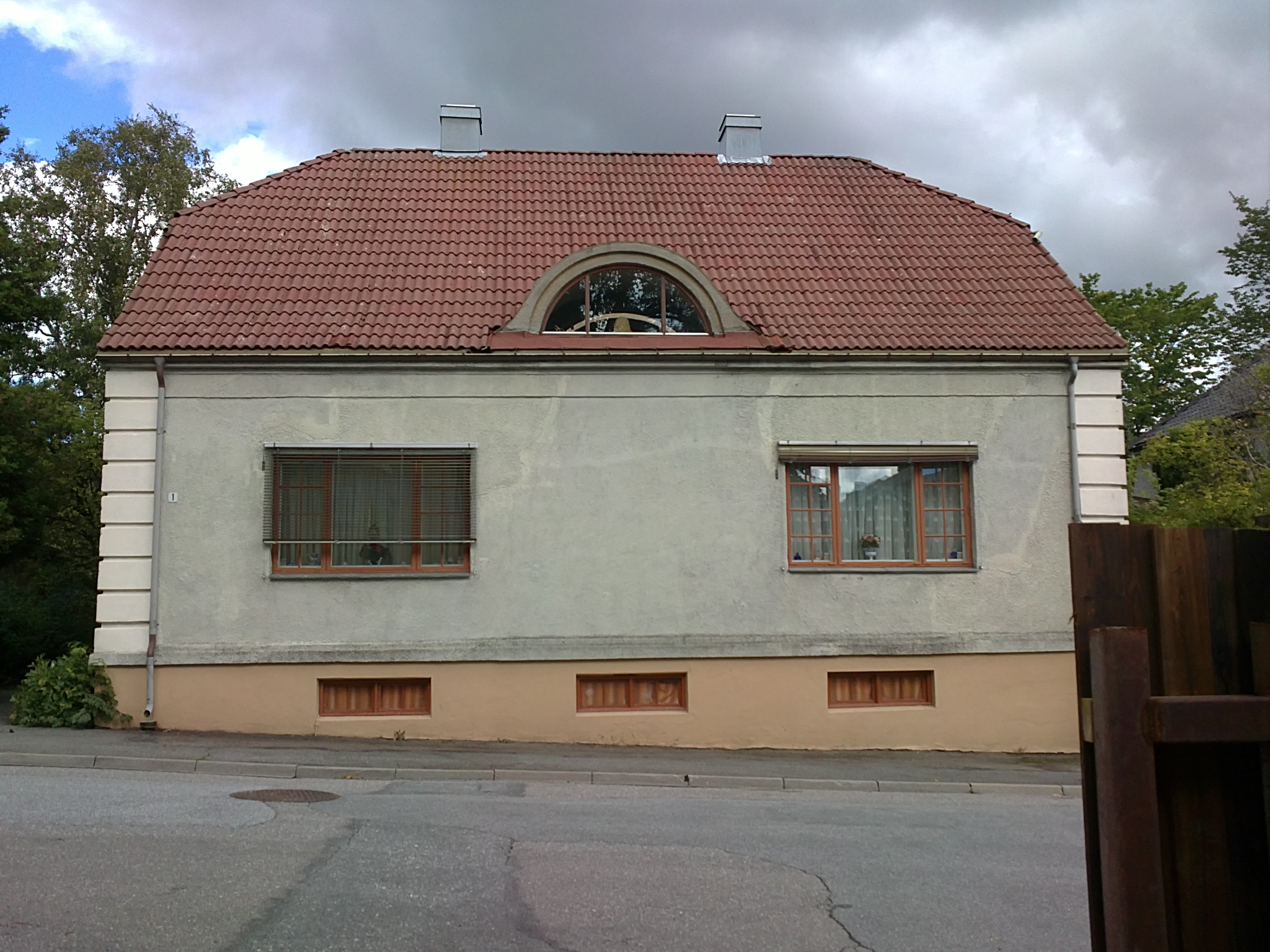 Bilde av Tallak Nielsens gate 1